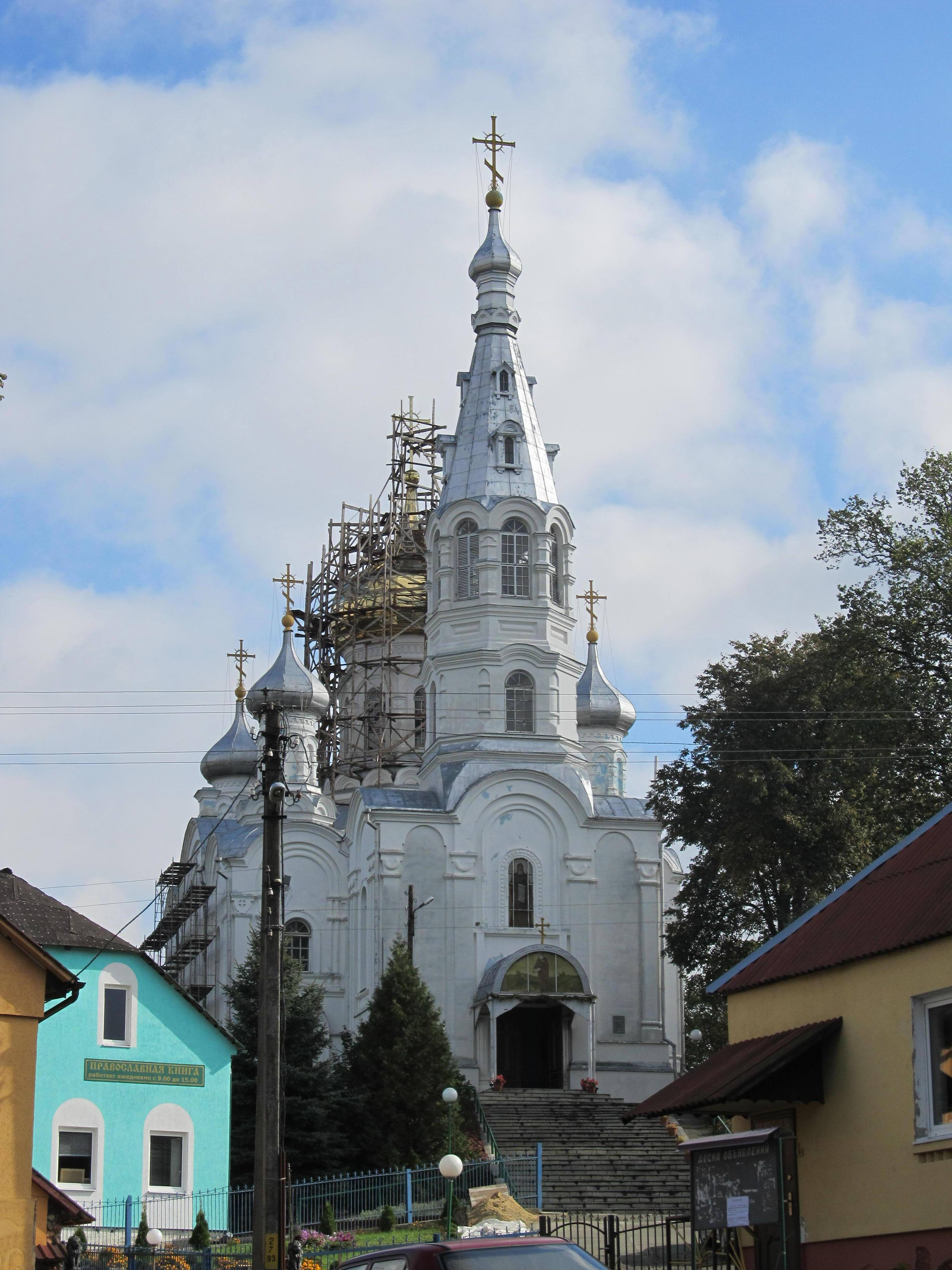 Беларуская (тарашкевіца): Сьвята-Сімяонаўская царква. г. Камянец This is a photo of Belarusian heritage monument. Reference number: 113Г000323 ( WLM)